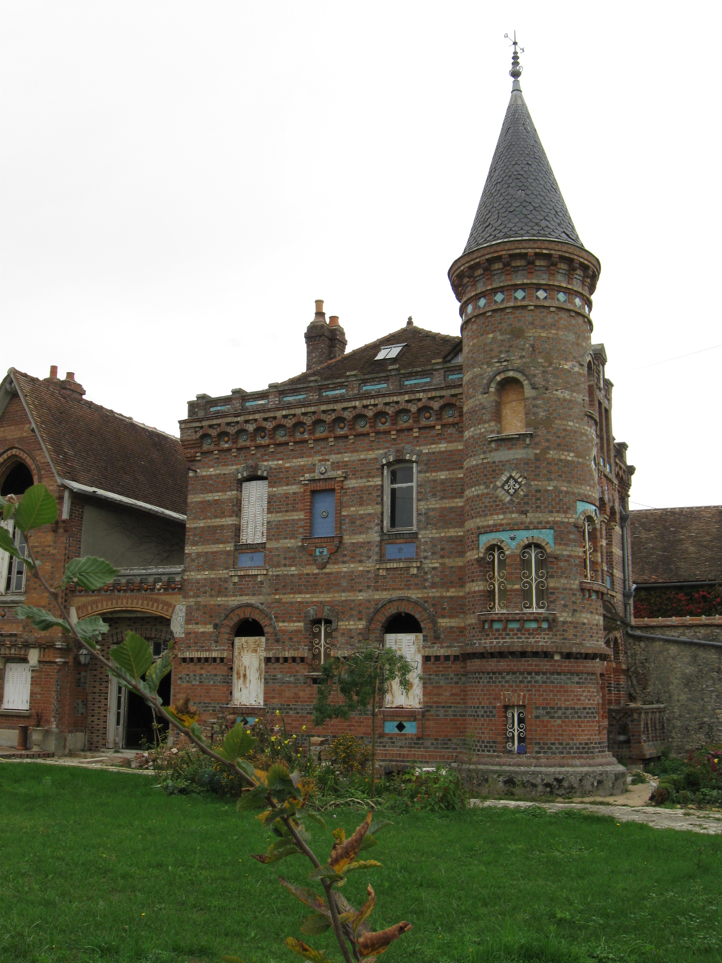 Ancienne propriété de la famille Boulenger, exploitants de carrières d’argile. (Cessoy-en-Montois, département de la Seine-et-Marne, région Île-de-France).